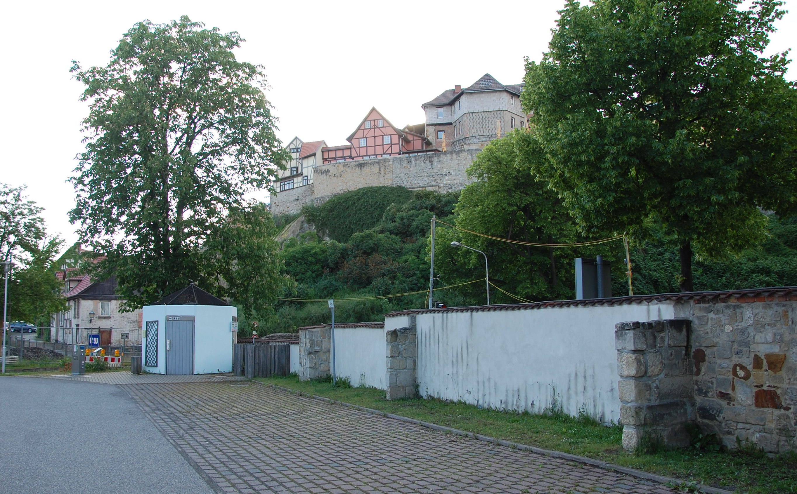 Grundstück Wipertistraße 2 in Quedlinburg